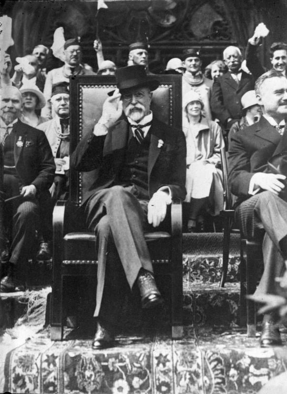 Das grösste Turnfest der Welt ! Das Sokolfest in Prag. Alle 5 bis 6 Jahre treffen sich die in dem Sokol-Verband zusammengeschlossenen Frauen und Männer zu einem Turnfest bei welchem mitunter 30 bis 40 000 Teilnehmer zusammenkommen. Der Präsident der Tschechoslovakei Massaryk beim Sokolfest in Prag. Information added by Wikimedia users.